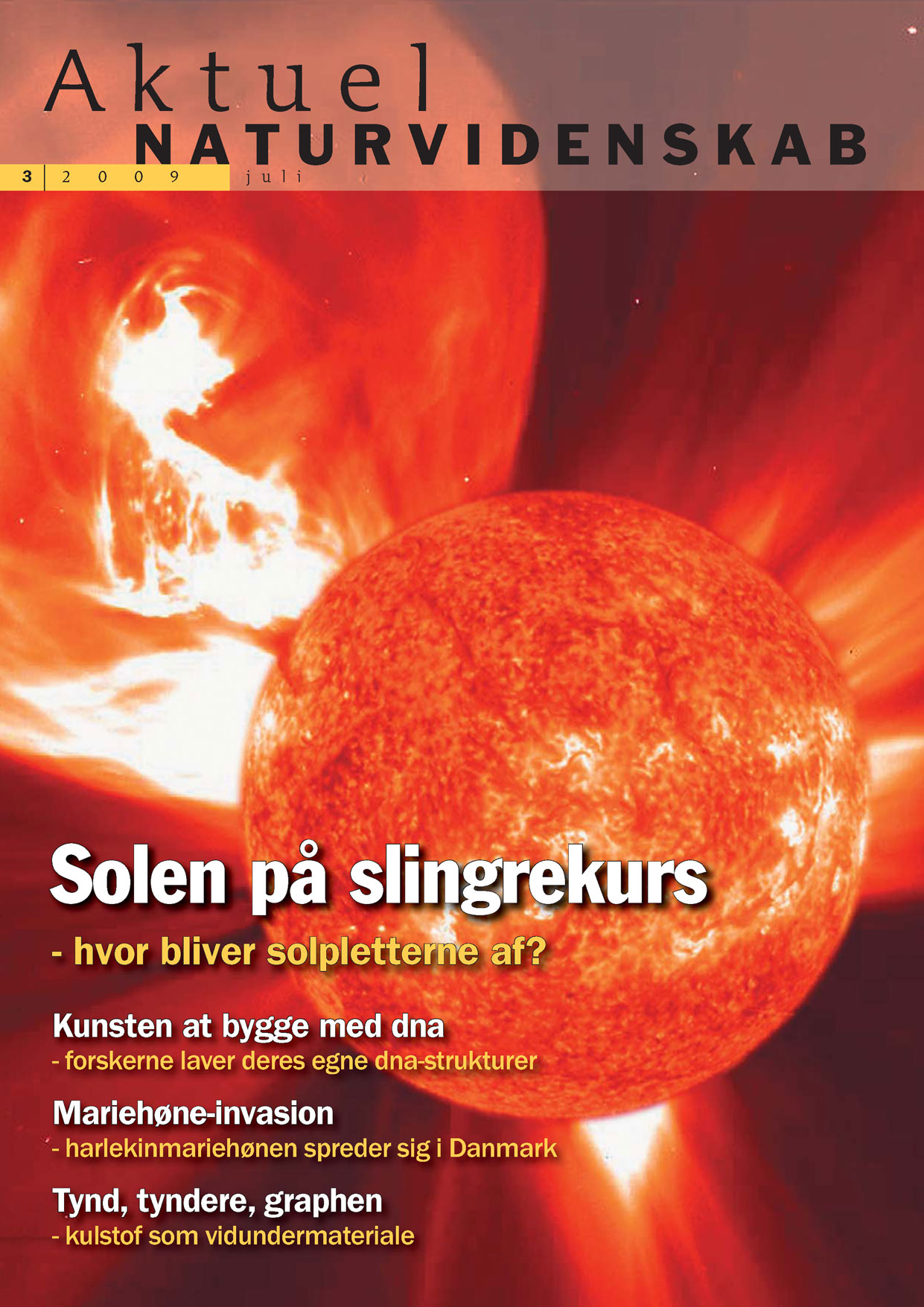 Forsiden af Aktuel Naturvidenskab nr. 3, 2009.